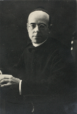 Àngel Rodamilans i Canals Ecclesiastical and Catalan composer